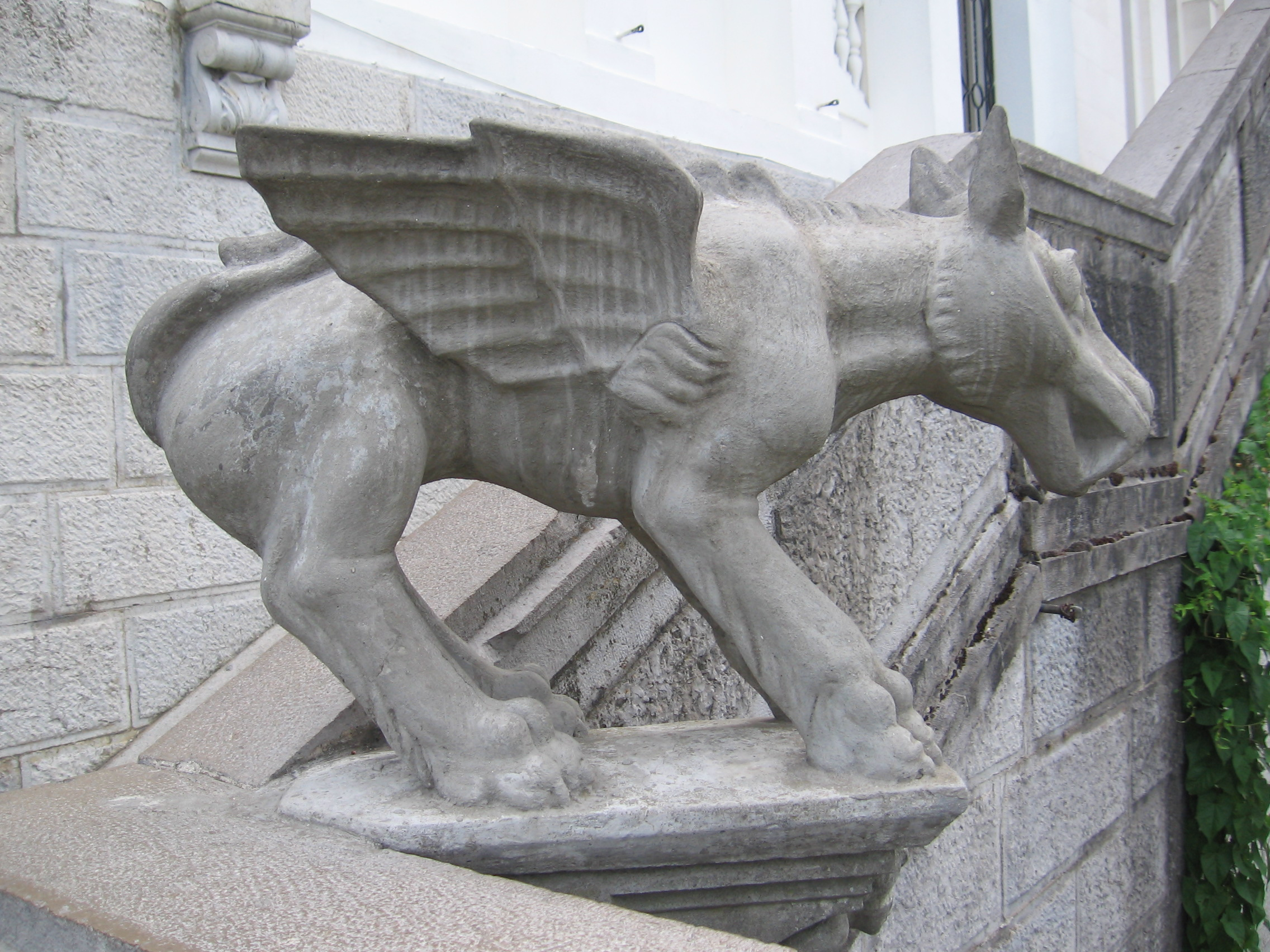 Фото